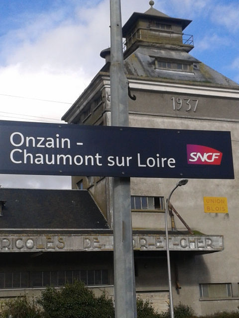 Gare d'Onzain - Chaumont-sur-Loire, Loir-et-Cher, France : Panneau signalétique depuis le 15 décembre 2013.